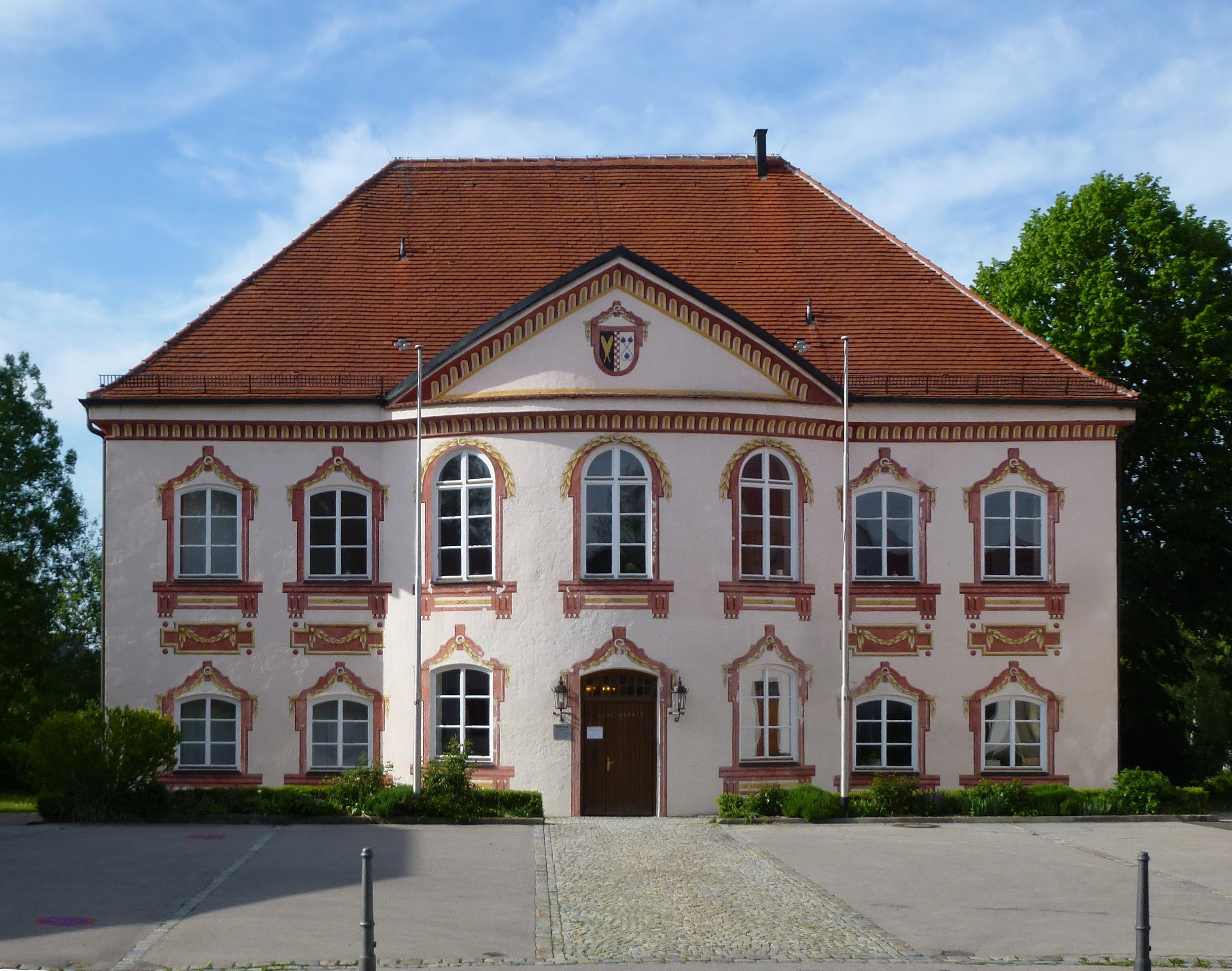 Türkenfeld, Schloßweg 2. Ehemaliges Schloß mit vorgewölbtem Eingangsbereich, heute kommunal genutzt. Ansicht von Süden